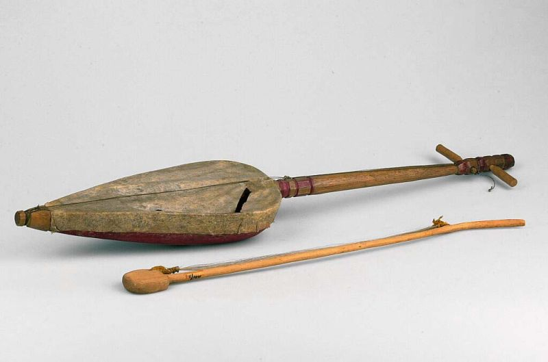 Strijkinstrument. Strijkluit met twee snaren Unknown language: Geso keso